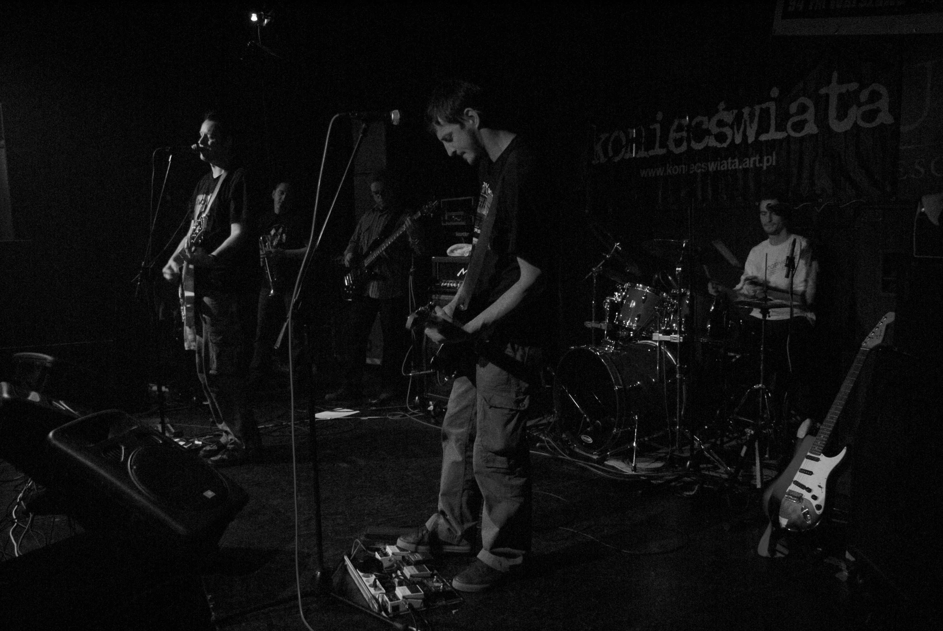 Zespół Koniec Świata podczas występu w Cogitaturze.